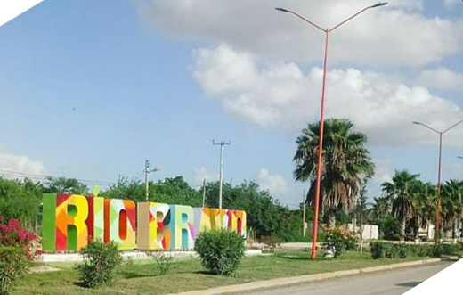 Cuidad Rio Bravo, Tamaulipas